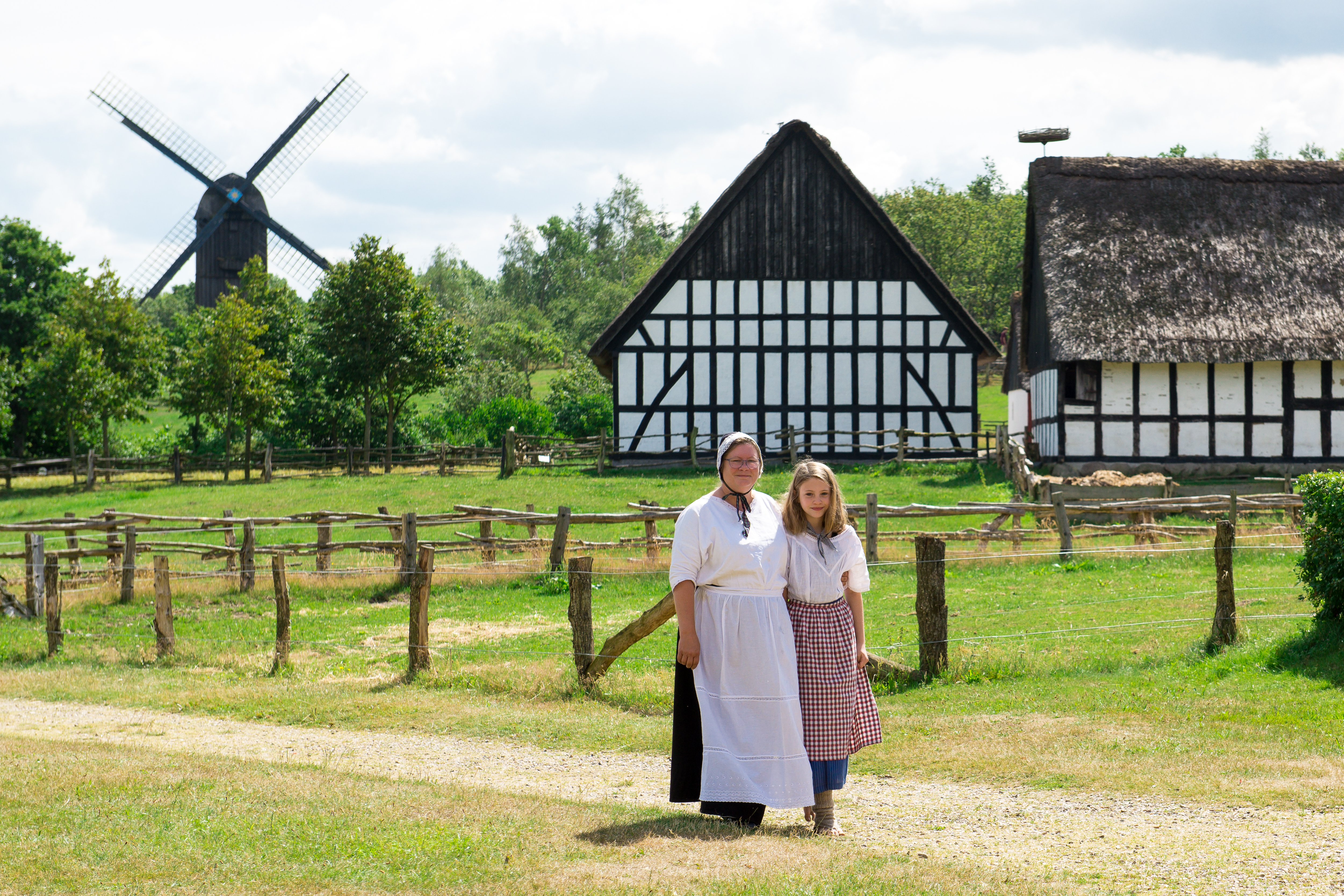 Limfjord Dänemark